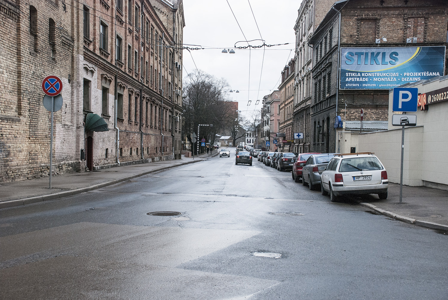 Aristida Briāna iela (Rīga)